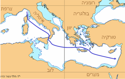 מסלול השיט